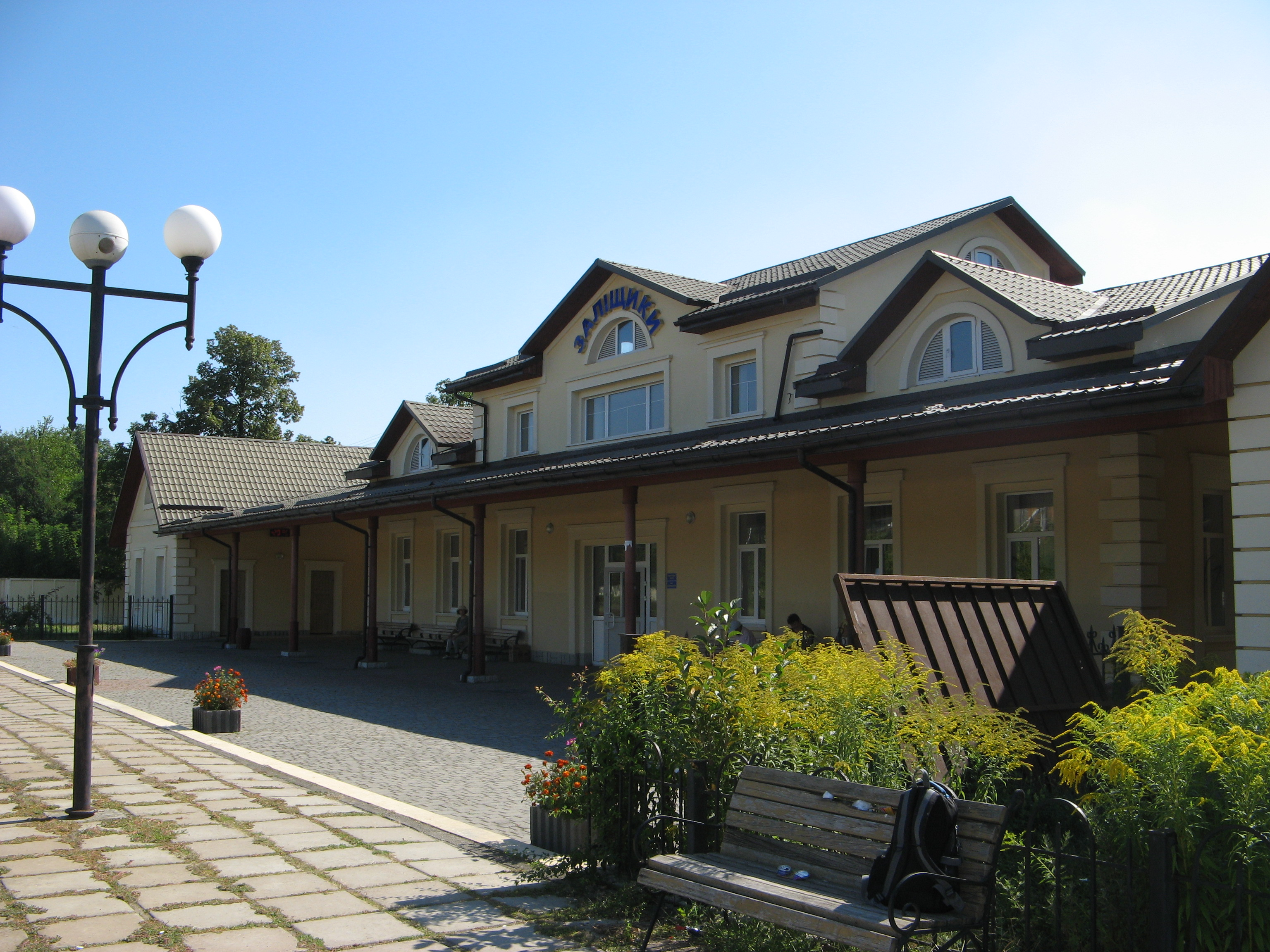 м. Заліщики. Залізнична станція